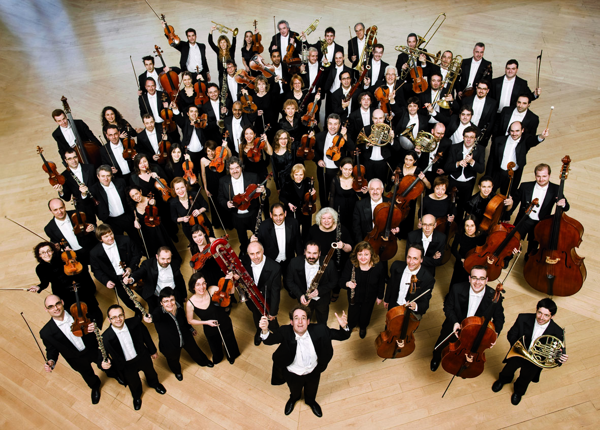 L'Orquestra Simfònica de Barcelona i Nacional de Catalunya (OBC) a la Temporada 2010-11